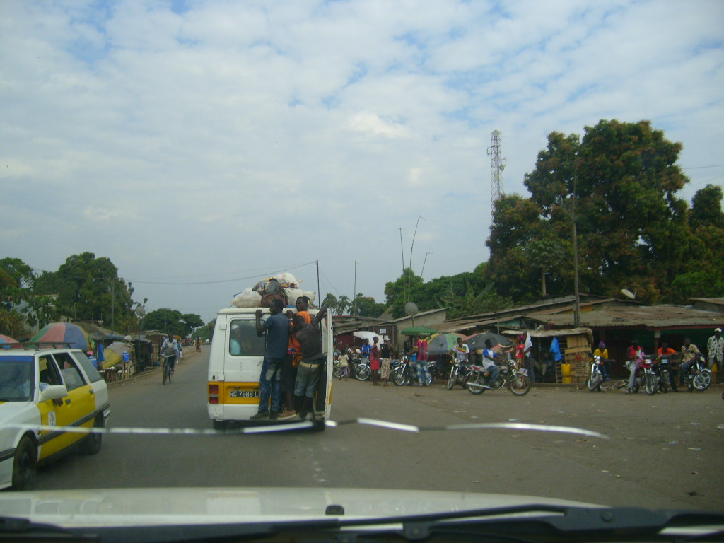 Guinea.Strada Conakry-Boffa